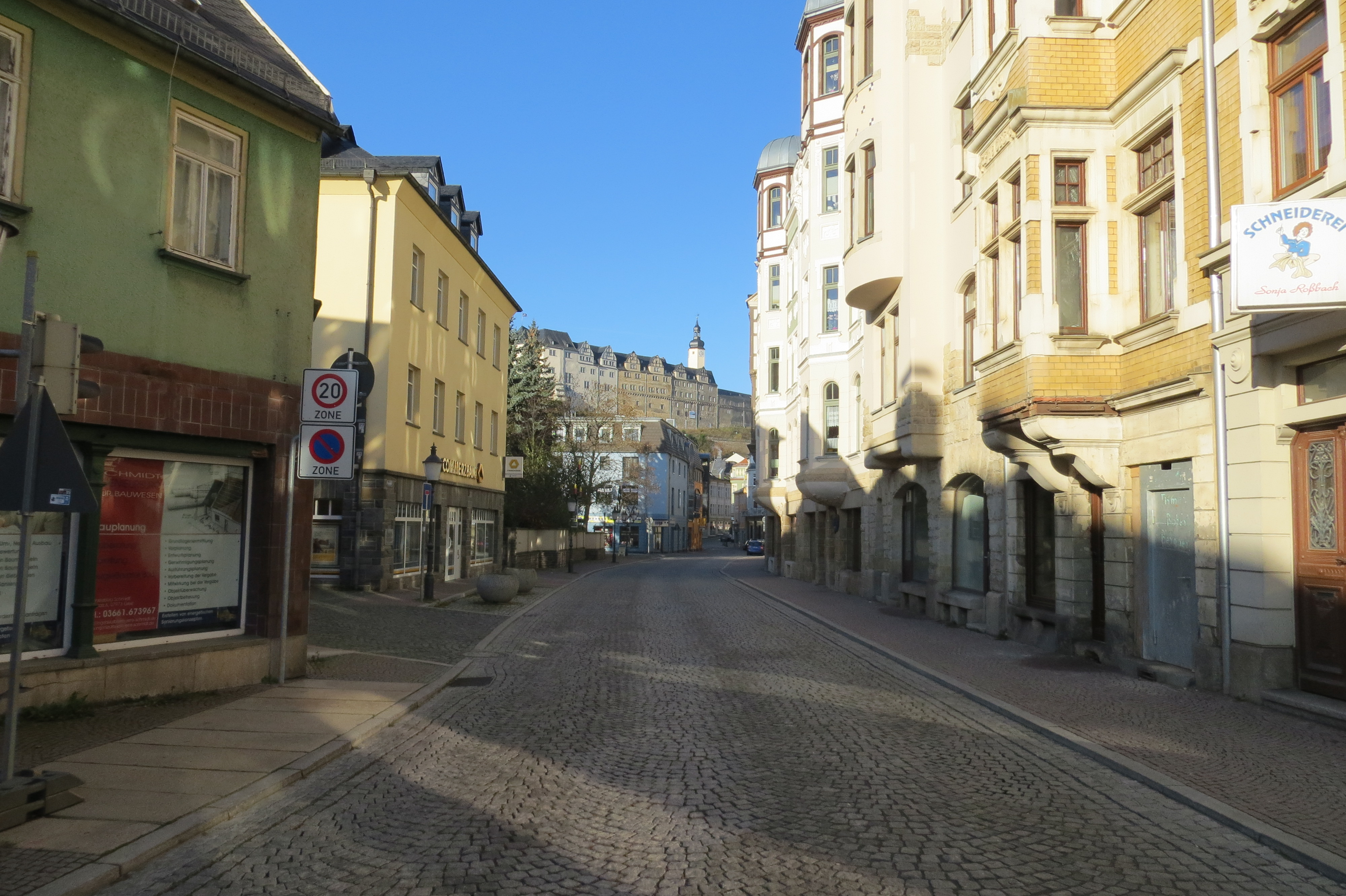 Thomasstraße in Greiz